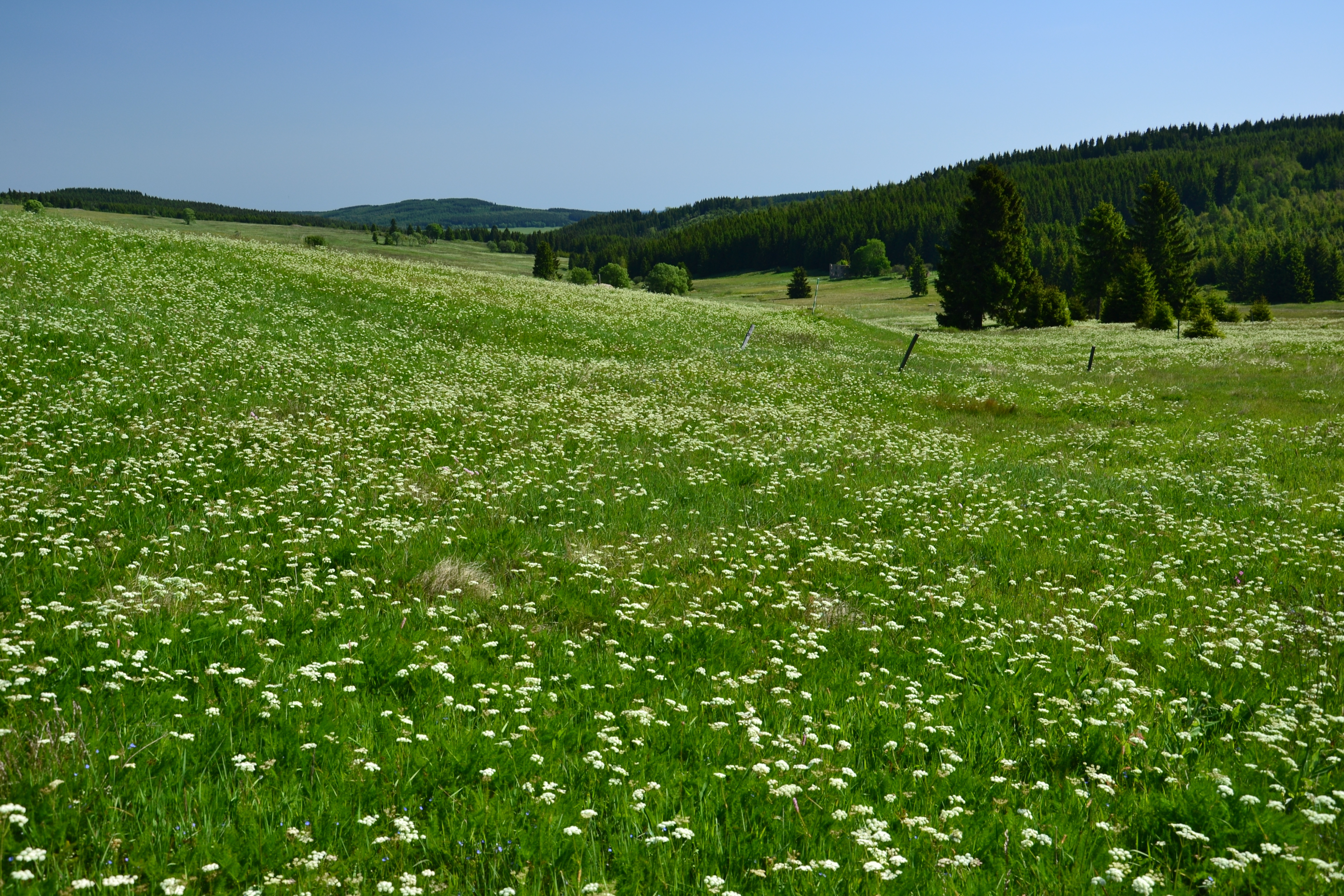 Horská louka u Háje